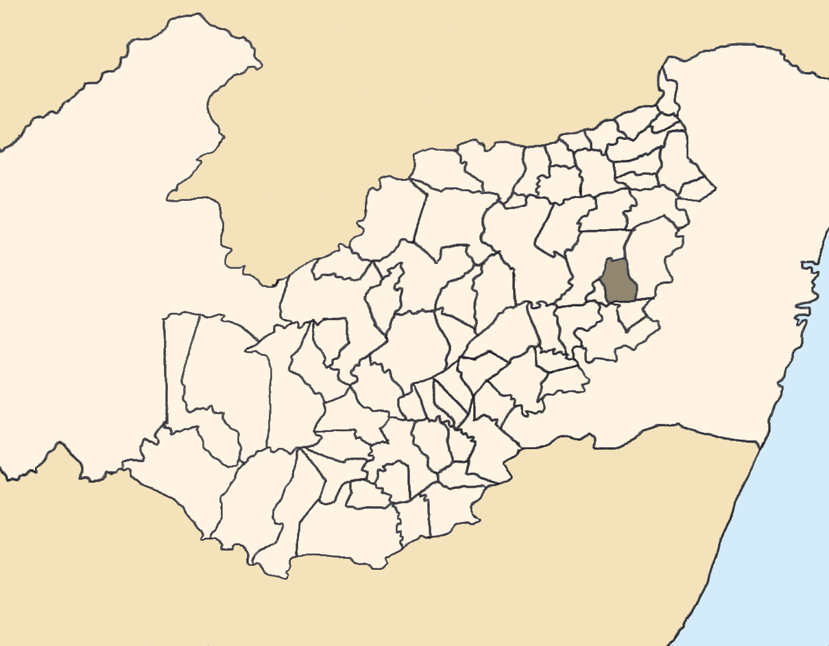 Mapa da mesorregião Agreste de Pernambuco (Brasil) subdivida em municípios. Em destaque, o município de Sairé. Map of the brazilian state of Pernambuco (mesorregião Agreste) showing the city of Sairé. Imagem tratada com o GIMP. Image made with GIMP.